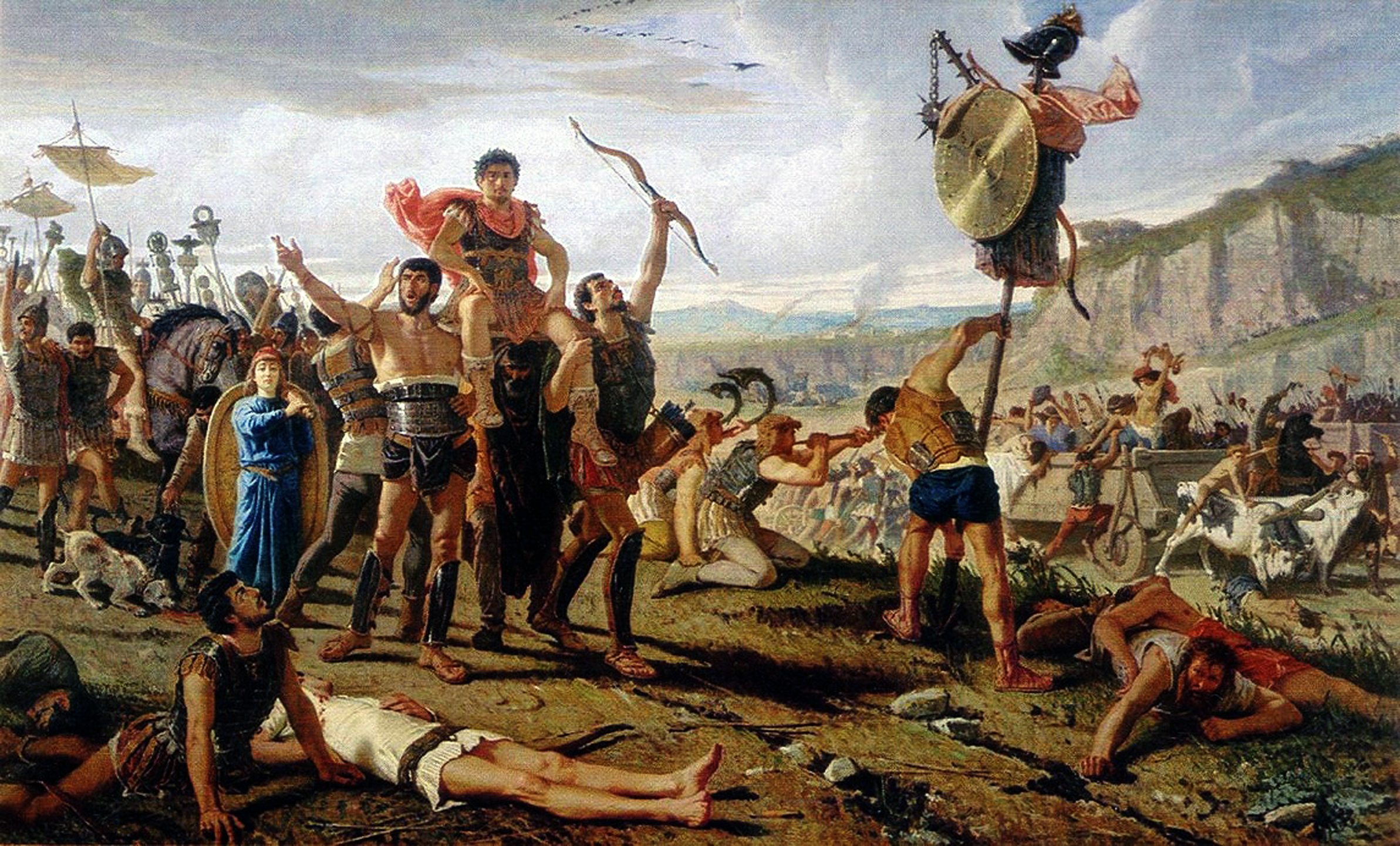 Mario vincitore dei Cimbri, olio su tela, Museo Civico di Foggia. Probabile bozzetto preparatorio per il dipinto custodito nella collezione permanente del Museo Capodimonte di Napoli, eseguito nel 1863 su commissione di Vittorio Emanuele II.